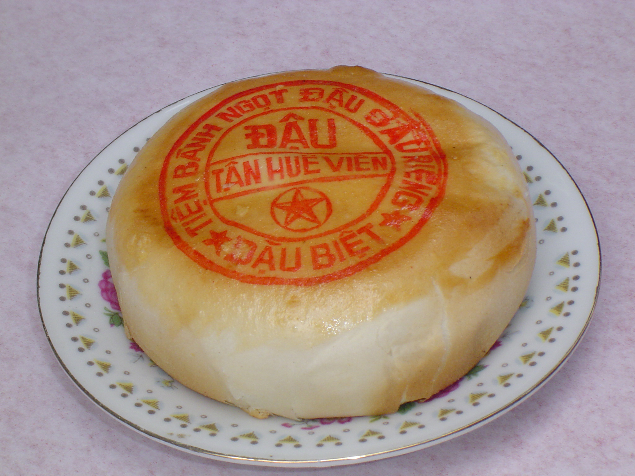 Một cái bánh pía hoàn chỉnh (với thông tin về thành phần, nhà sản xuất và xuất xứ in trên mặt